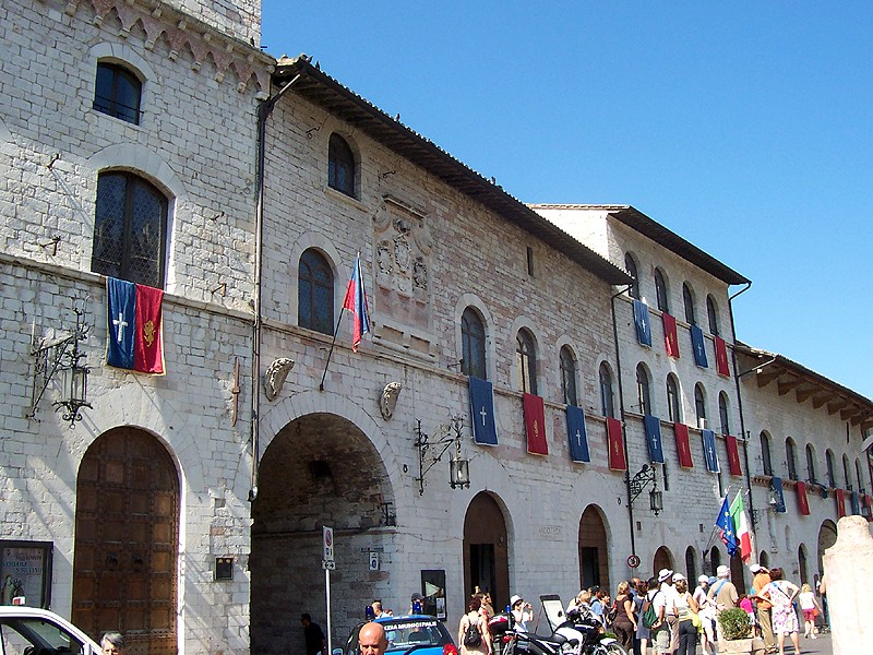 Assisi - Palazzo dei Priori (Municipio)